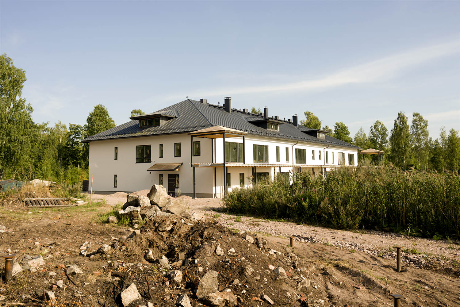 Vartsalan talotehdas kunnostettuna, kuvattu 2013.